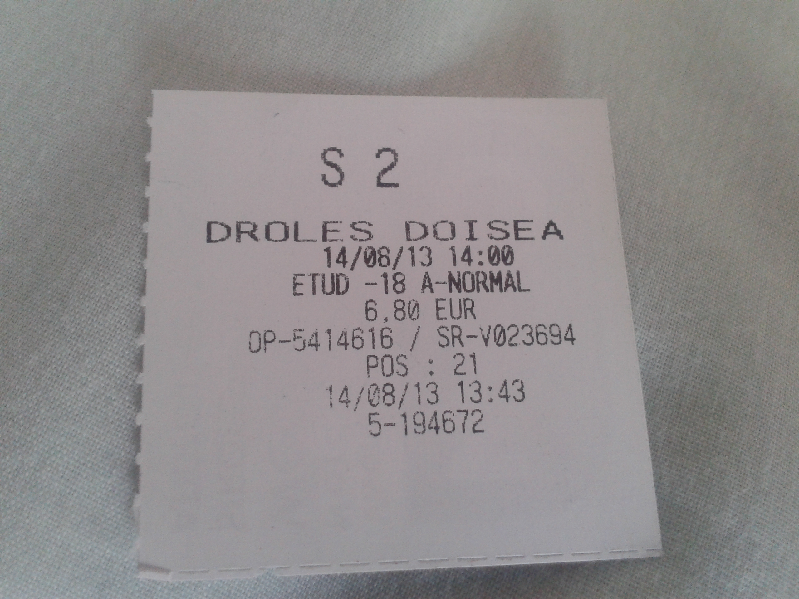 Ticket donnant accès à la salle 2 du cinéma "Cinéville" d'Hénin-Beaumont (Pas-de-Calais) pour la première séance de "Drôles d'Oiseaux", le 14 août 2013